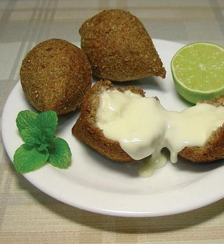 FOTO QUIBE FRITO DE CARNE E REQUEIJÃO CREMOSO